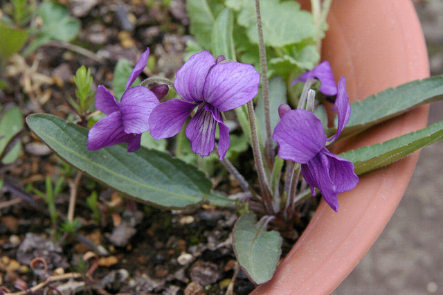 スミレ （神奈川県横浜市）Viola mandshurica (Yokohama-city, Kanagawa, JAPAN)